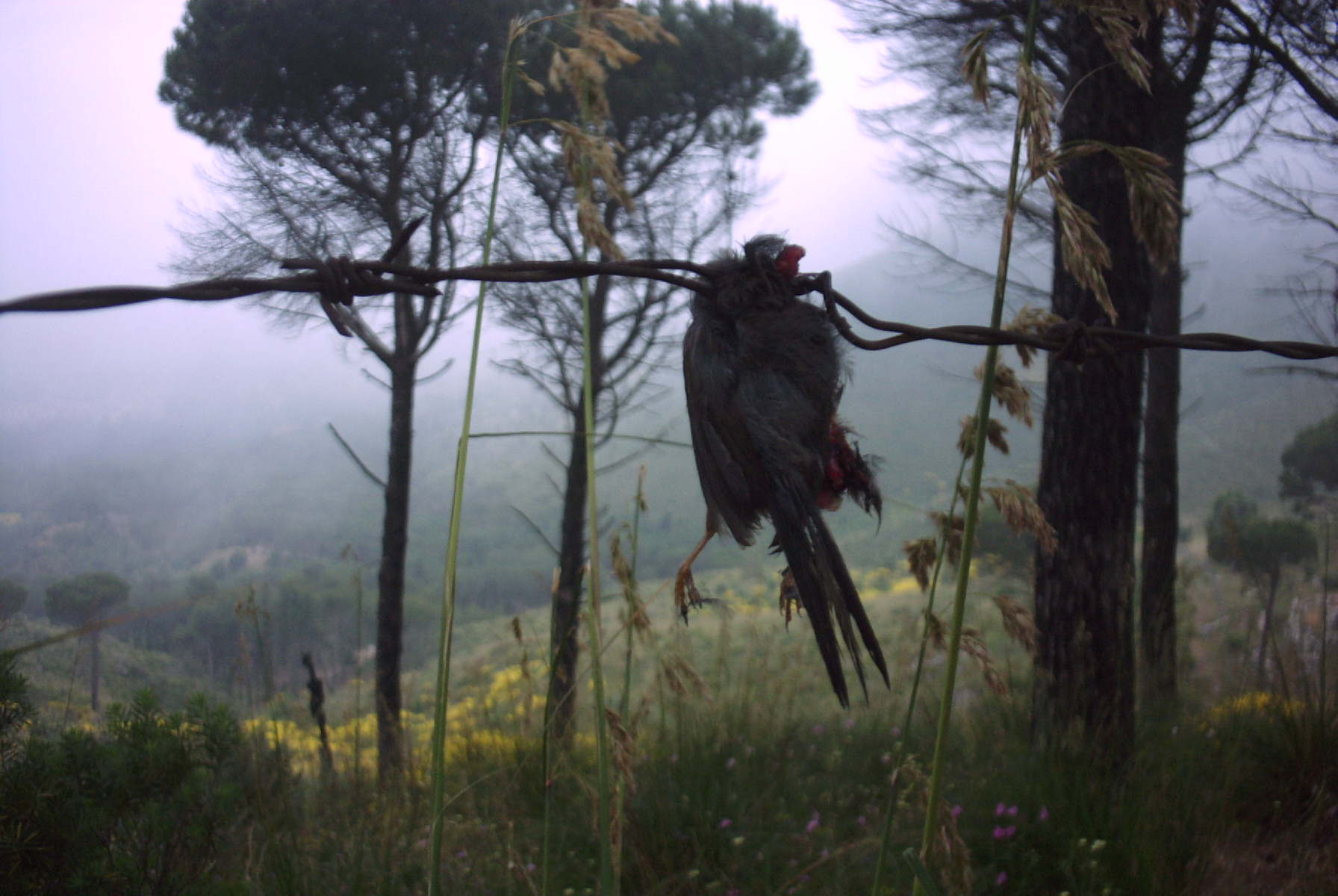 Sylvia melanocephala prey of Lanius senator (Monte Cuccio, Palermo, Sicily)